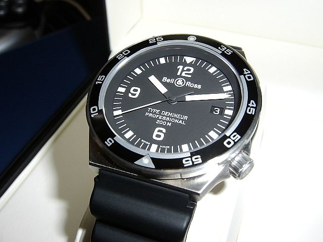 Affichage analogique.Bell&Ross Watch